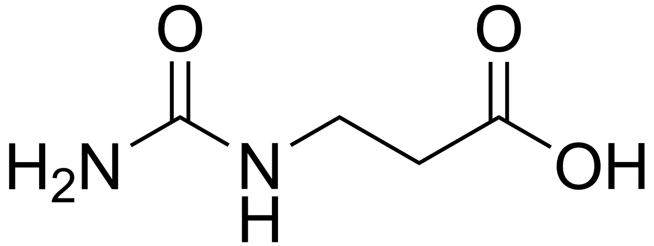 chemical structure of 3-ureidopropionate (ureidopropionic acid, N-carbamoyl-beta-alanine)